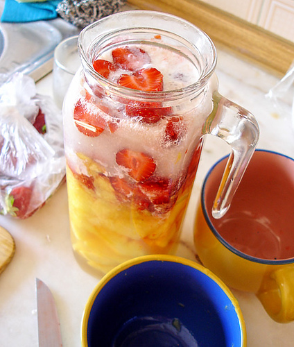 morangos, bananas, pessegos,leite de soja e sumo de limão ... algarve, 05